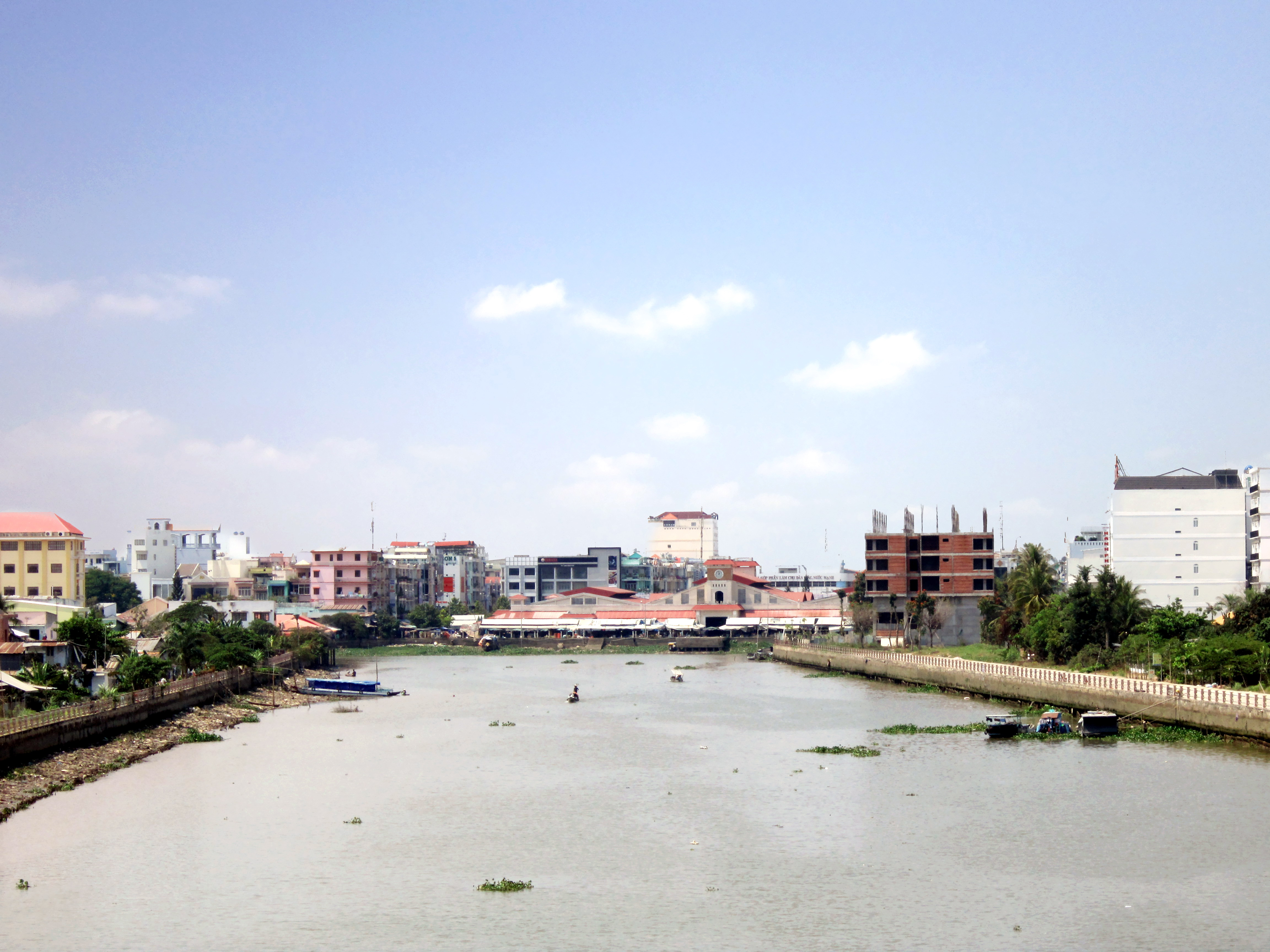 Trung tâm thương mại Cái Khế (còn gọi là chợ Cái Khế) ở phường Cái Khế, quận Ninh Kiều, TP. Cần Thơ, Việt Nam. Đây là một khu thương mại lớn nhất ở thành phố này.